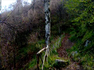 I tre faggi secolari